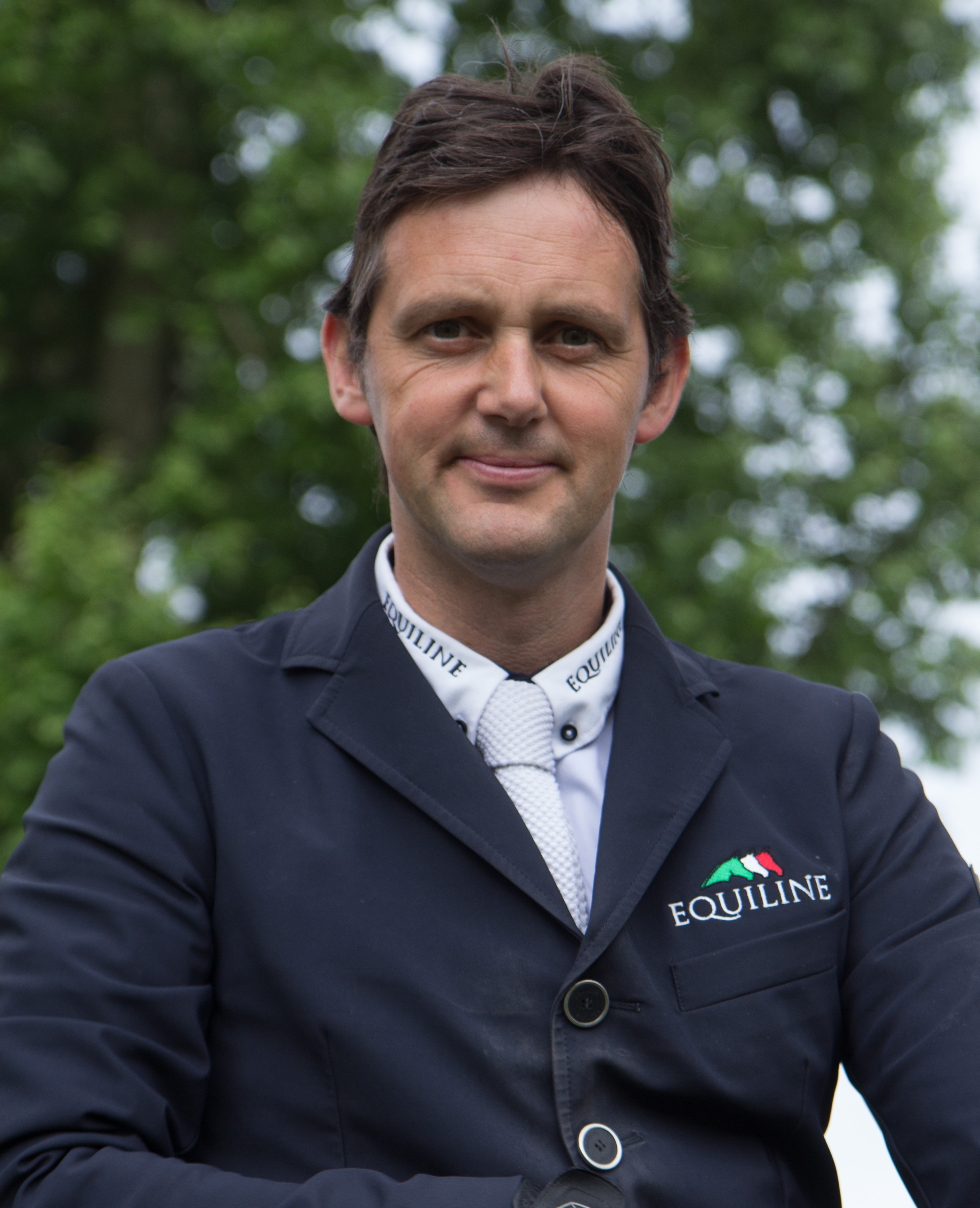 Internationales Wiesbadener Pfingstturnier 2018. CSI 4* Springprüfung KI.S *** m. Stechen (1,50m) "Preis des Hessischen Ministerpräsidenten": Billy Twomey auf Kimba Flamenco